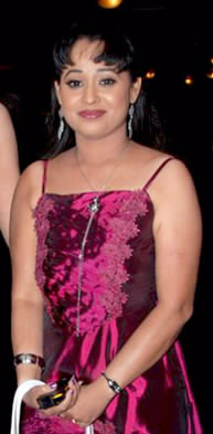 Sonalika Joshi at 500 episodes of 'Taarak Mehta Ka Ooltah Chashma' bash